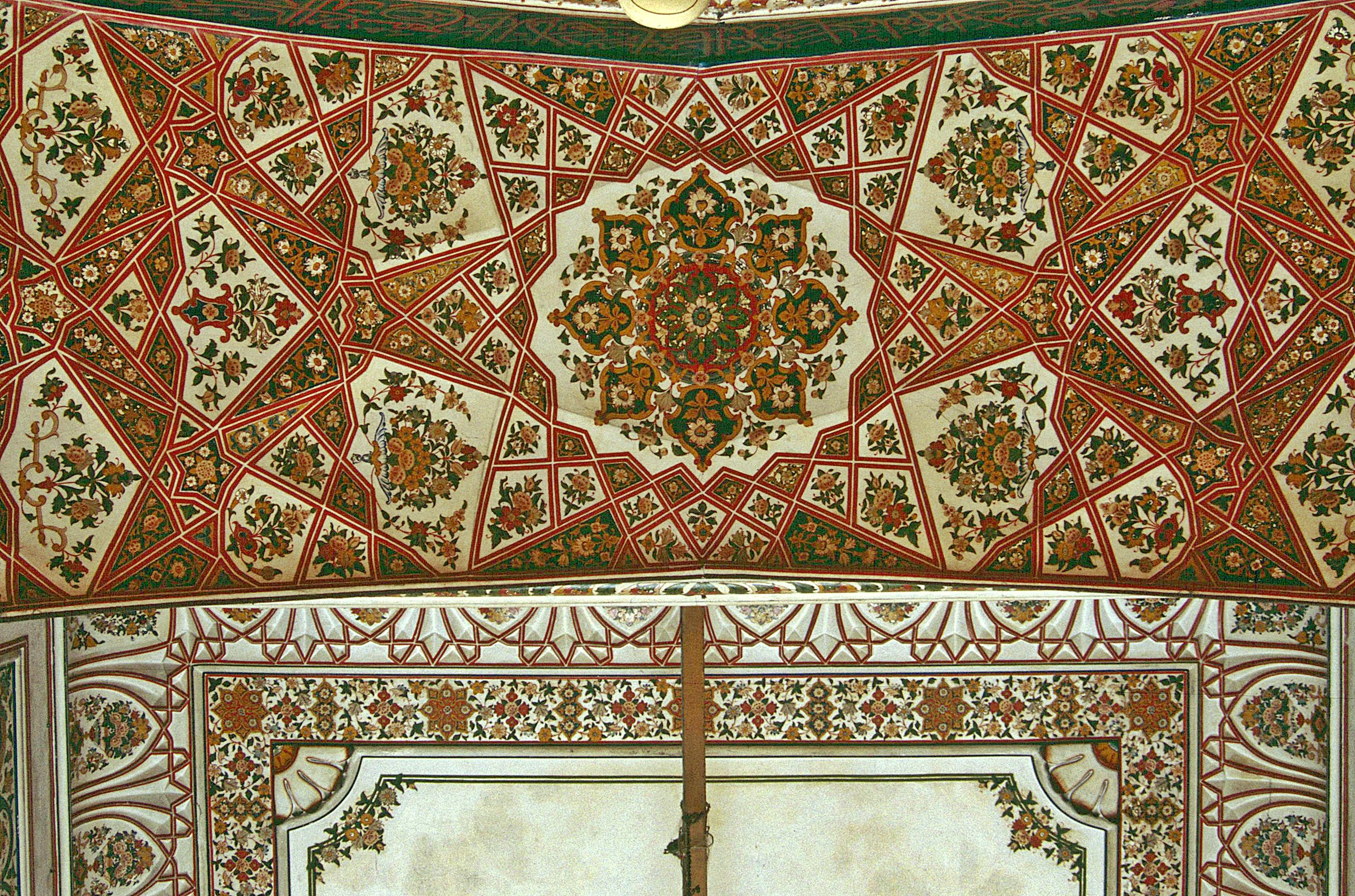 Decke in der Mahabat-Khan-Moschee in Peshawar